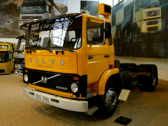 Volvo FL7, Volvo Museum, Göteborg